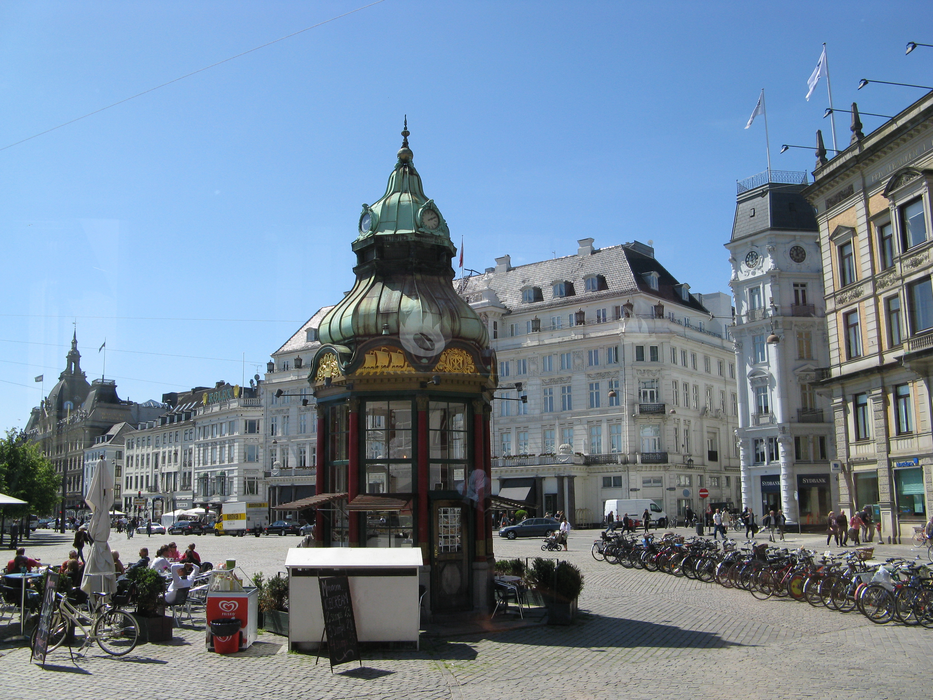 The old kiosk at Kongens Nytorv in Copenhagen, Denmark